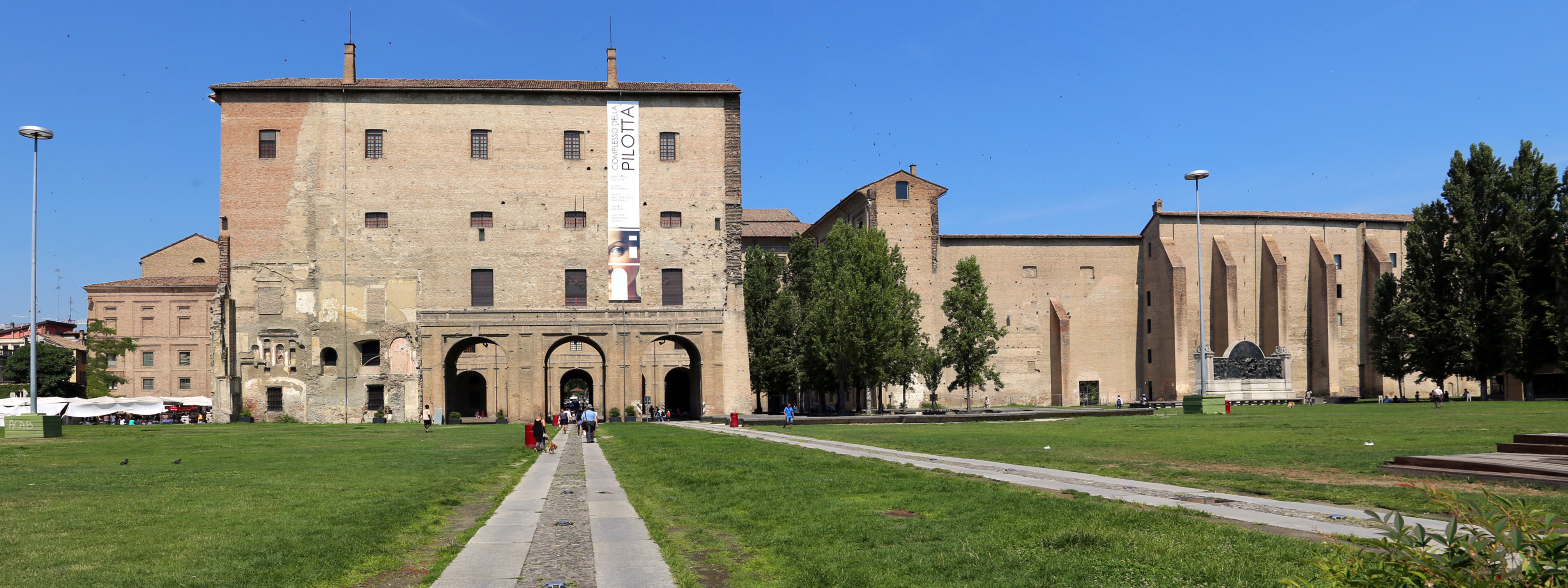 palazzo della Pilotta This is a photo of a monument which is part of cultural heritage of Italy.